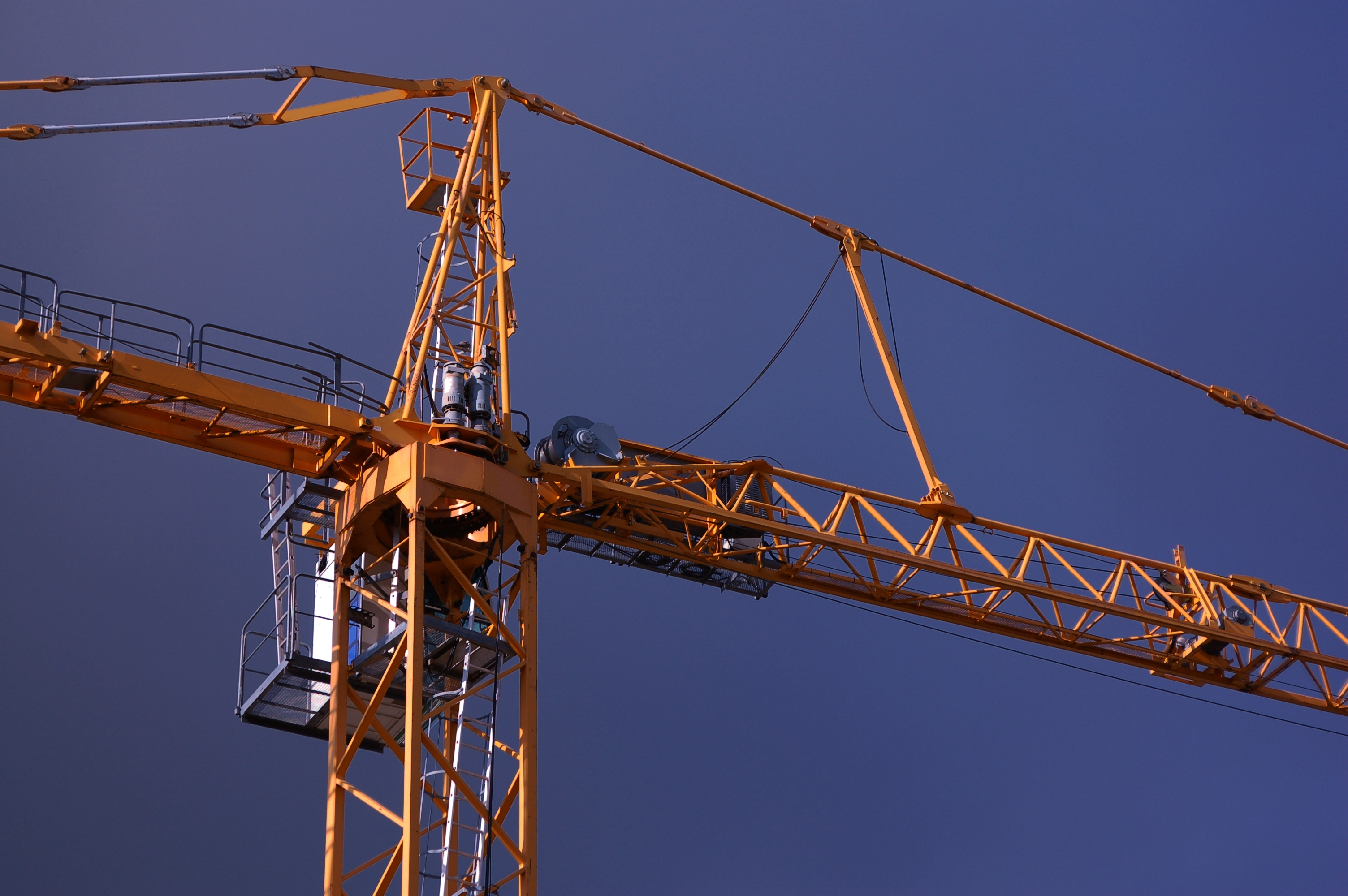 Exemple de grue de chantier de construction.